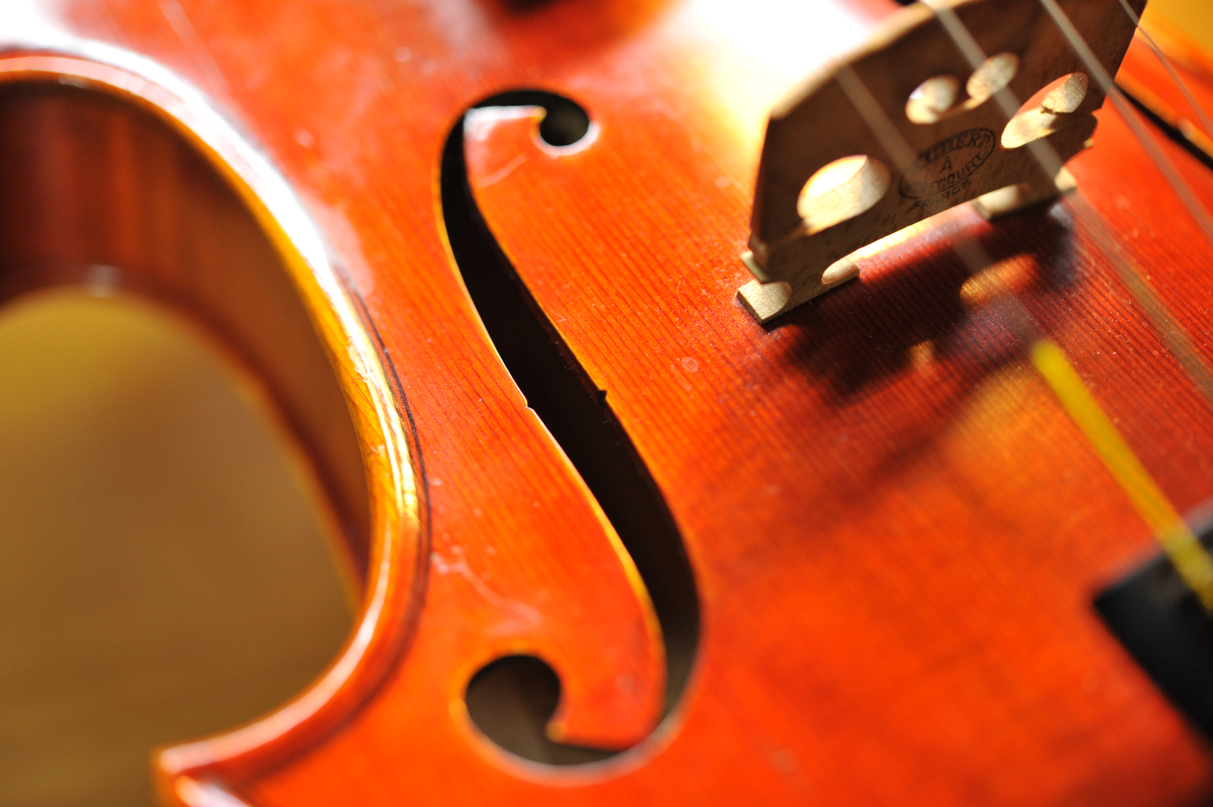 Suzuki Violin No.580 4/4 (1982) f-hole